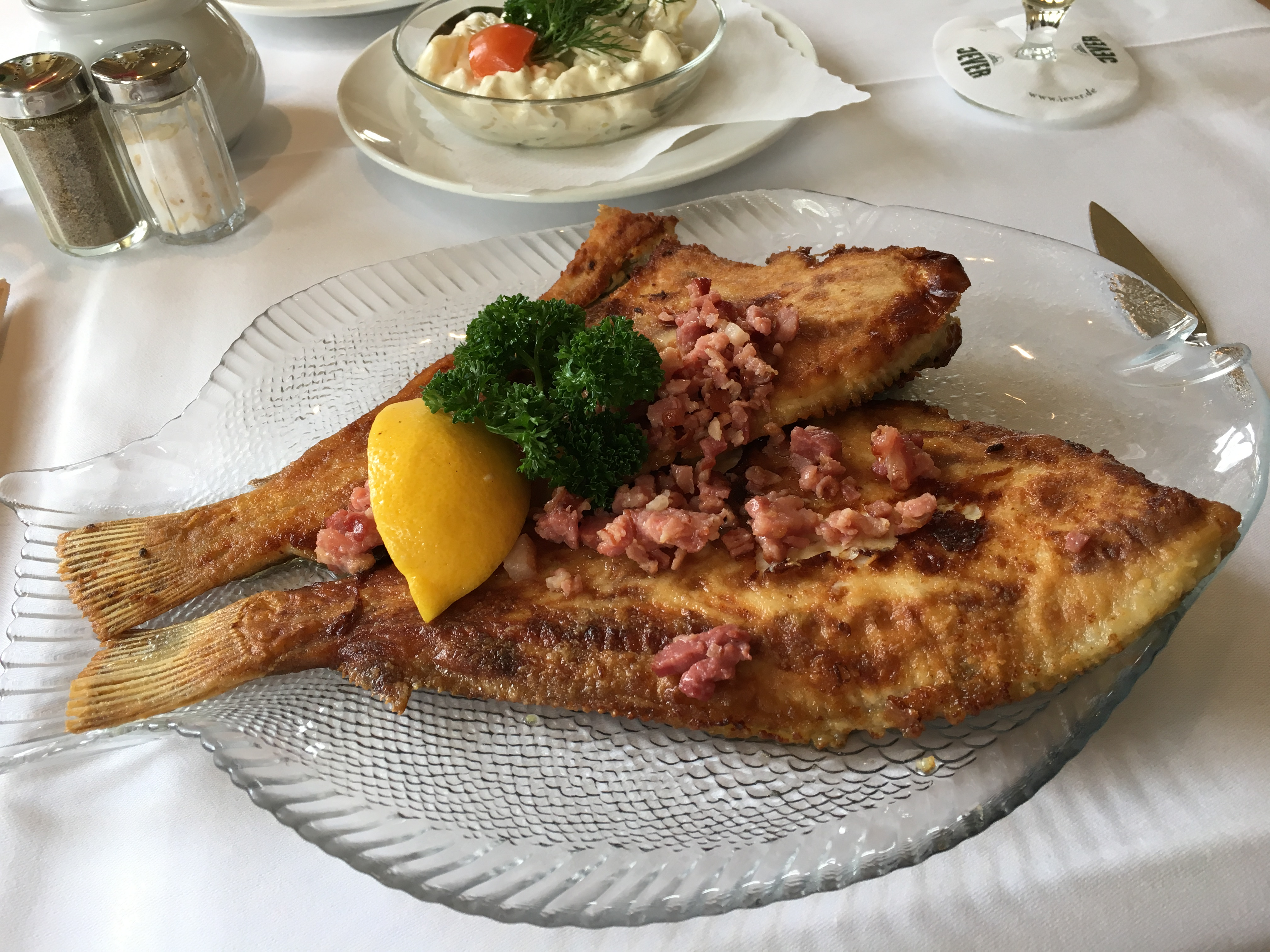 Hamburg-Finkenwerder: Scholle Finkenwerder Art; serviert auf der Halbinsel Hamburg-Finkenwerder im Restaurant "Finkenwerder Landungsbrücke"